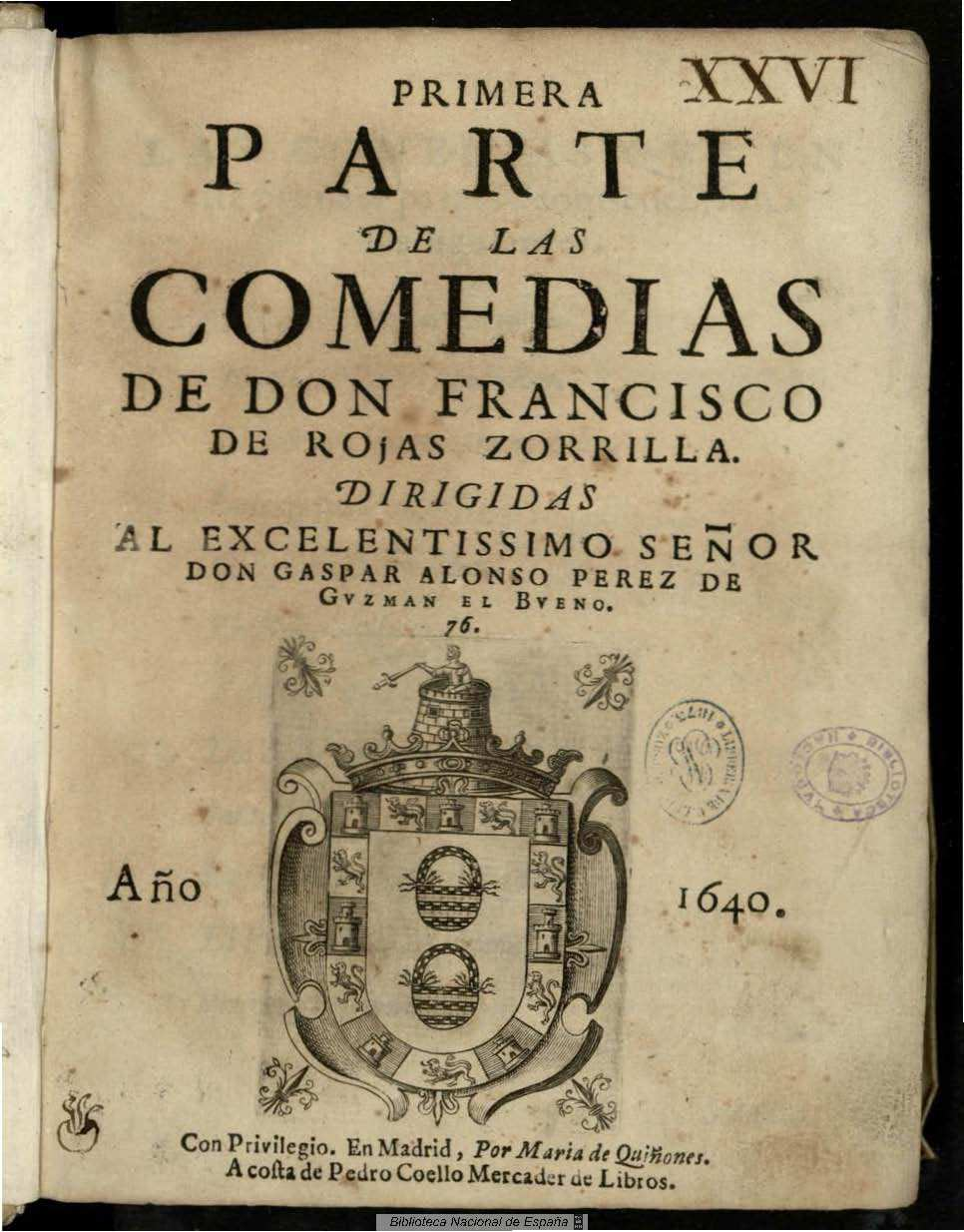 Primera parte de las comedias de Don Francisco de Rojas Zorrilla ... Autor: Rojas Zorrilla, Francisco de (1607-1648) Fecha: 1640 Datos de edición: En Madrid por María de Quiñones a costa de Pedro Coello ... Contenido: No ay amigo para amigo, h. 1-22v ; No ay ser padre siendo Rey, h. 23-47 ; Donde ay agravios no ay zelos, h. 47v-71 ; Casarse por vengarse, h. 71v-94v ; Obligados y ofendidos, h. 99-124v ; Persiles y Sigismunda, h. 125-148v ; Peligrar en los remedios, h. 149-173v ; Los zelos de Rodamonte, h. 174-199v ; Santa Isabel, Reina de Portugal, h. 200-222 ; La traición busca el castigo, h. 222v-248 ; El profeta falso Mahoma, h. 248v-273v ; Progne y Filomena, 274-300vNo ay amigo para amigo, h. 1-22v ; No ay ser padre siendo Rey, h. 23-47 ; Donde ay agravios no ay zelos, h. 47v-71 ; Casarse por vengarse, h. 71v-94v ; Obligados y ofendidos, h. 99-124v ; Persiles y Sigismunda, h. 125-148v ; Peligrar en los remedios, h. 149-173v ; Los zelos de Rodamonte, h. 174-199v ; Santa Isabel, Reina de Portugal, h. 200-222 ; La traición busca el castigo, h. 222v-248 ; El profeta falso Mahoma, h. 248v-273v ; Progne y Filomena, 274-300v